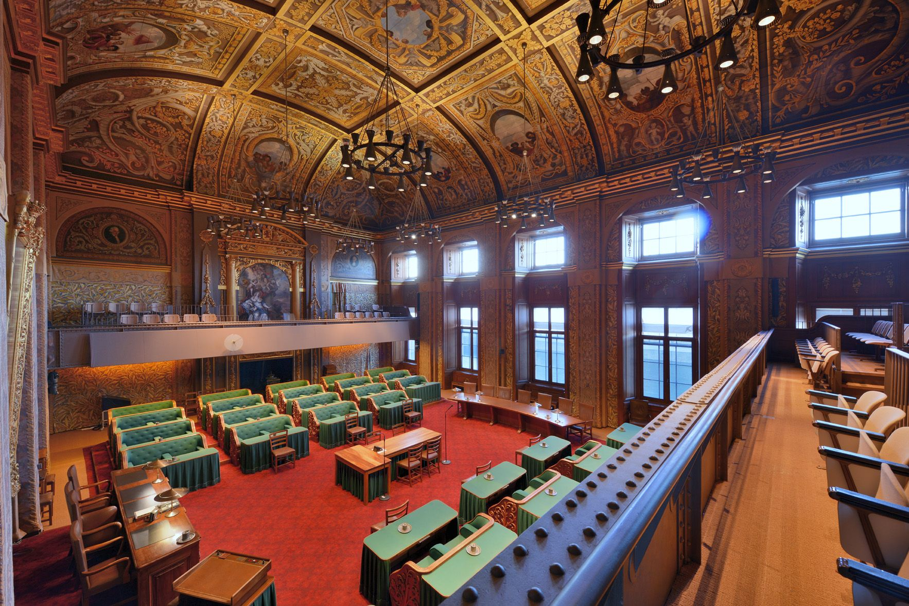 Plenaire zaal Eerste Kamer